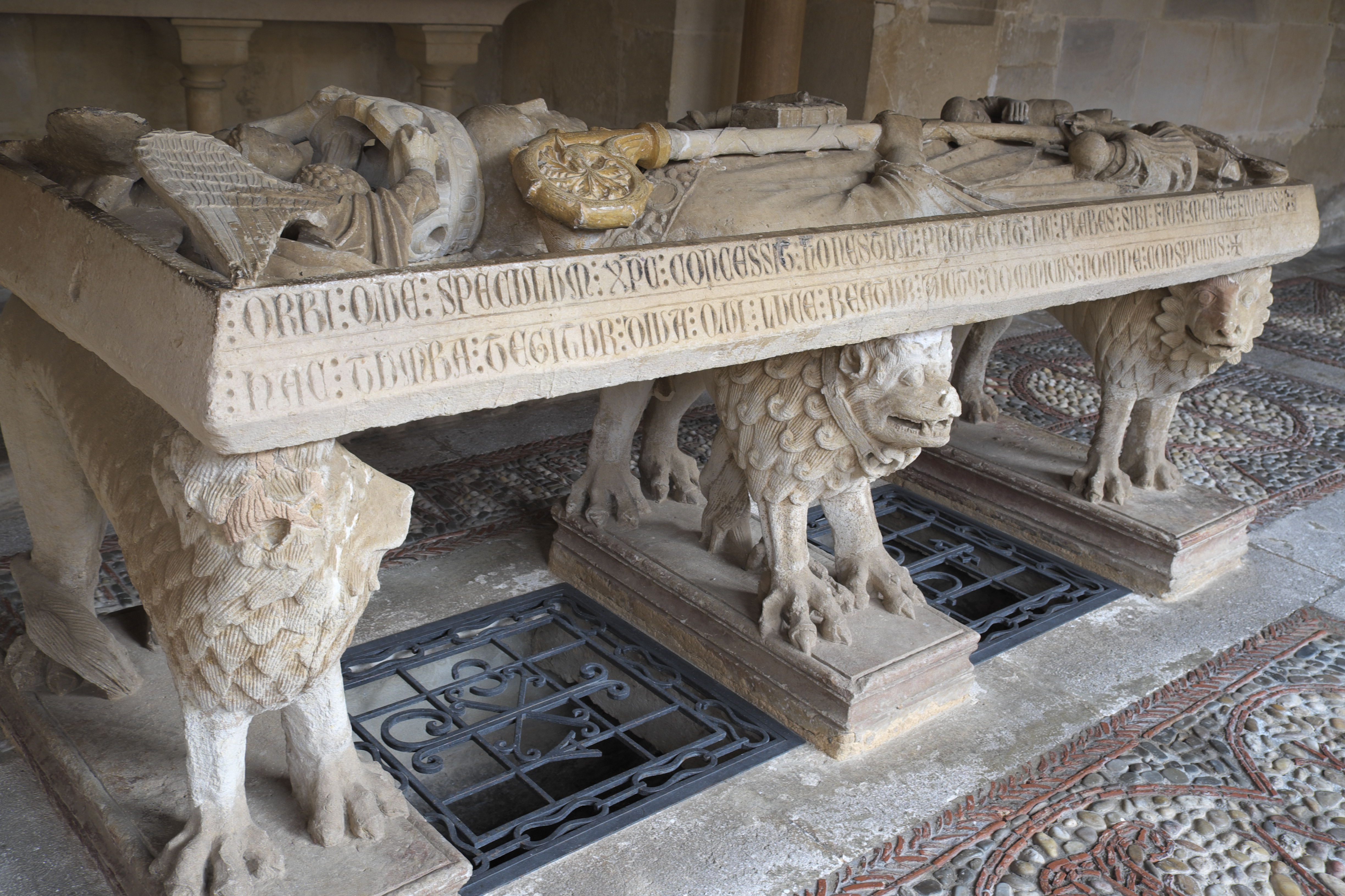 Kloster Santo Domingo de Silos in Santo Domingo de Silos in der Provinz Burgos (Region Kastilien-León/Spanien), Grab eines Abtes mit Liegefigur